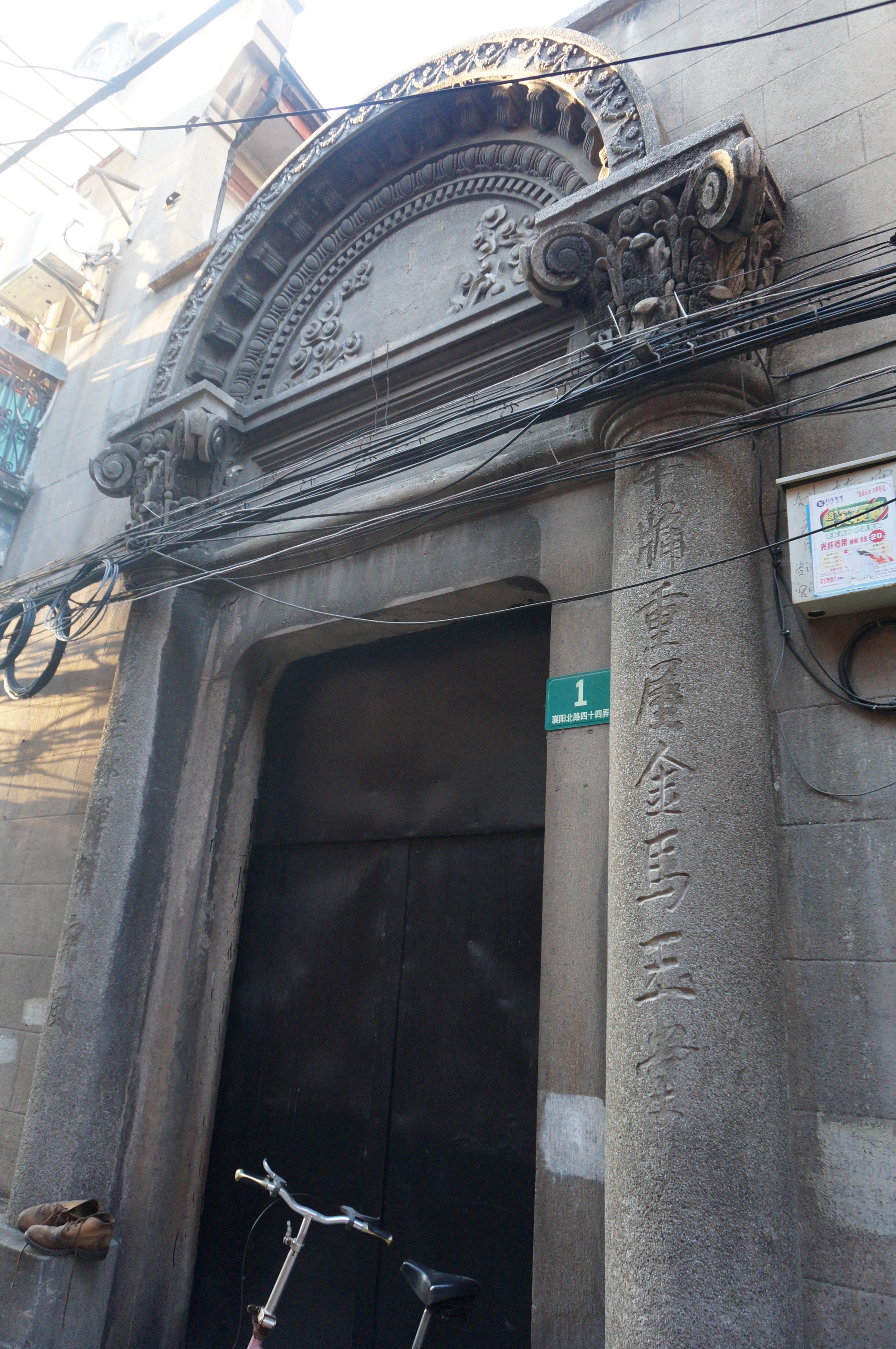 中文（中国大陆）: 上海襄阳北路上一处石库门大门